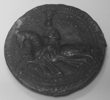 Rudolph I of Bohemia